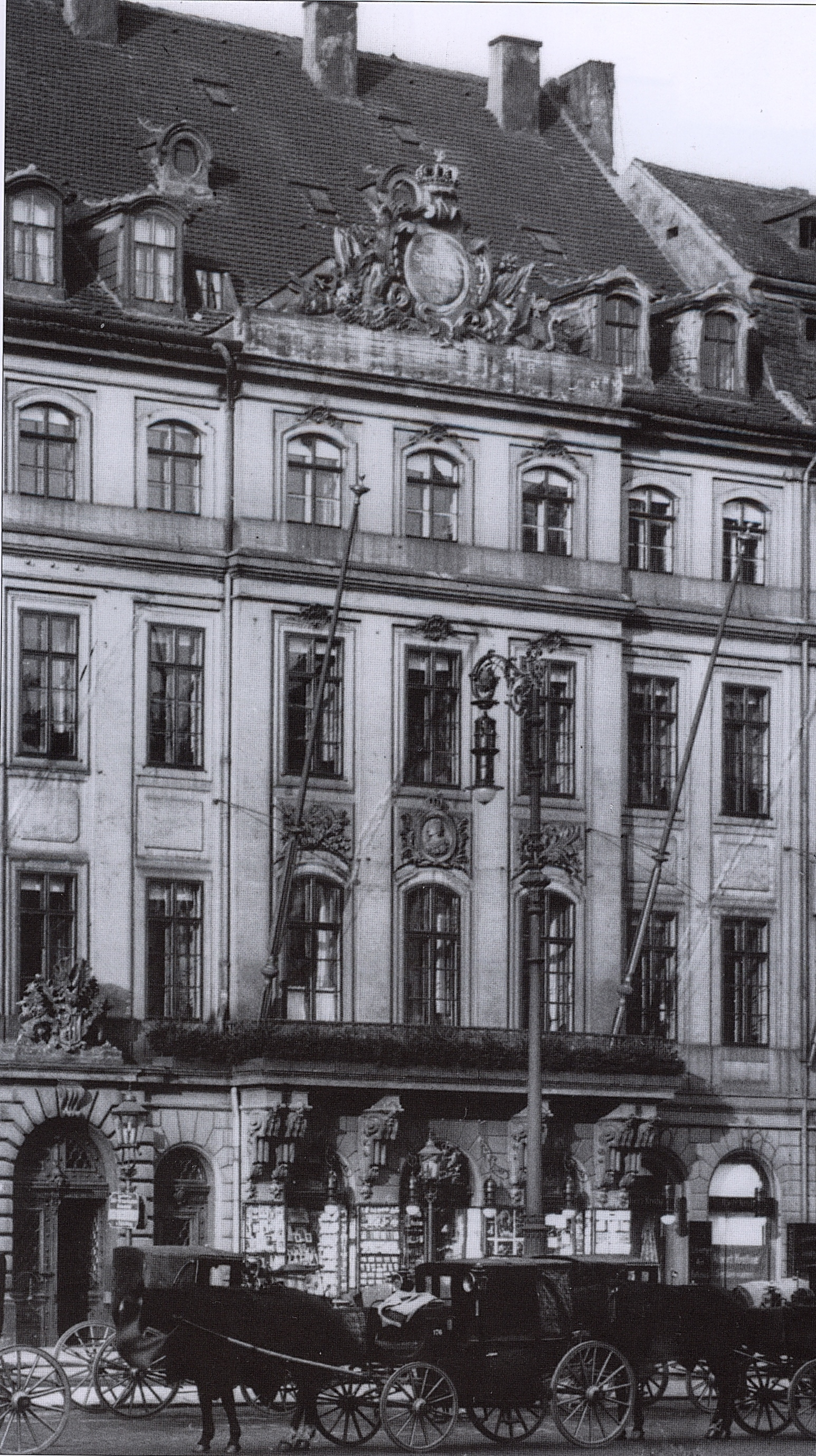 Dresden, Altstädter Rathaus am Altmarkt 1 (Döringsches Haus), Fotografie um 1900.